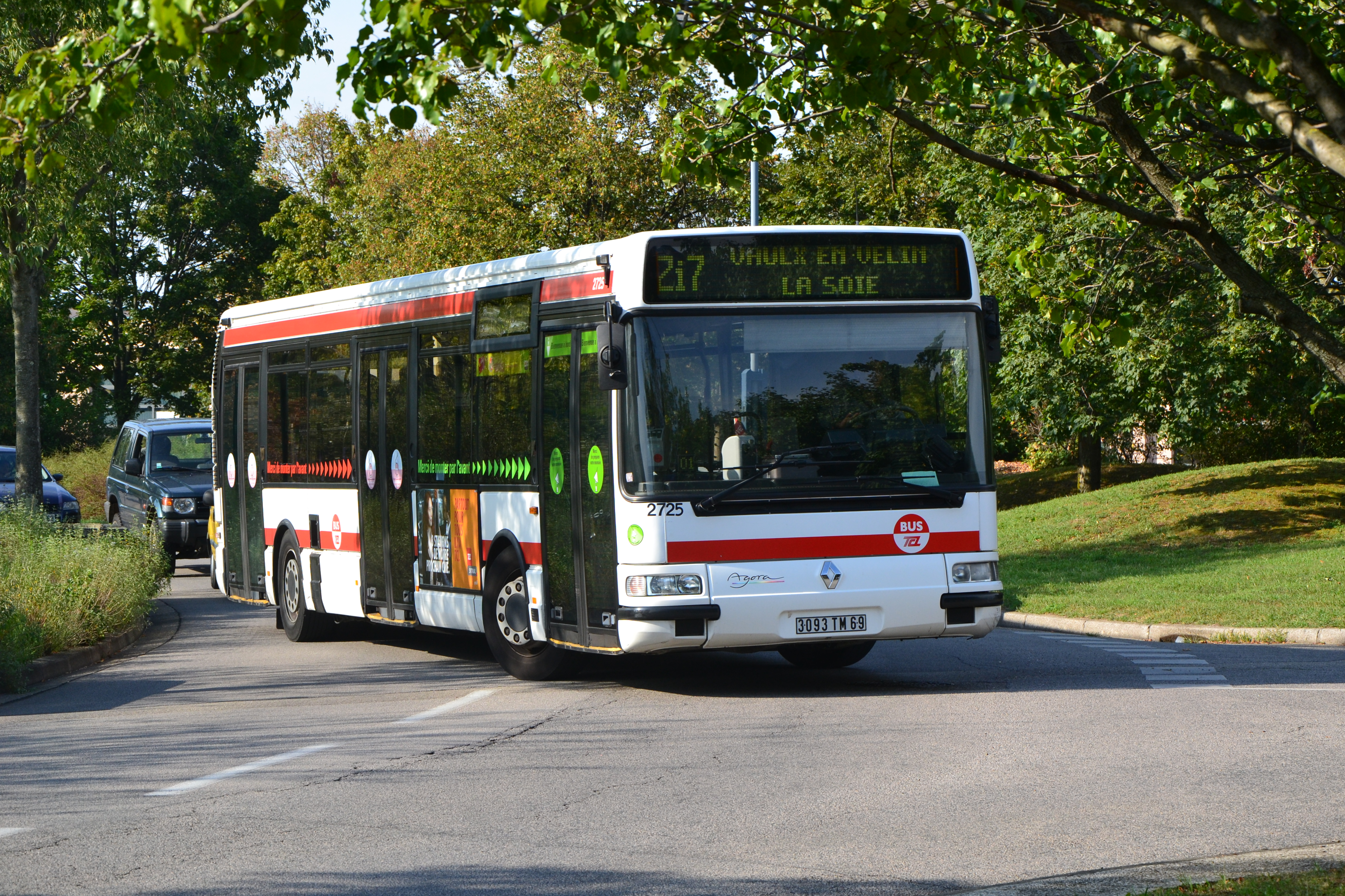 Renault Agora S n°2725 sur la ligne Zi7, arrivant à son terminus Bron de l'Homme sur la commune de Bron, près de Lyon.